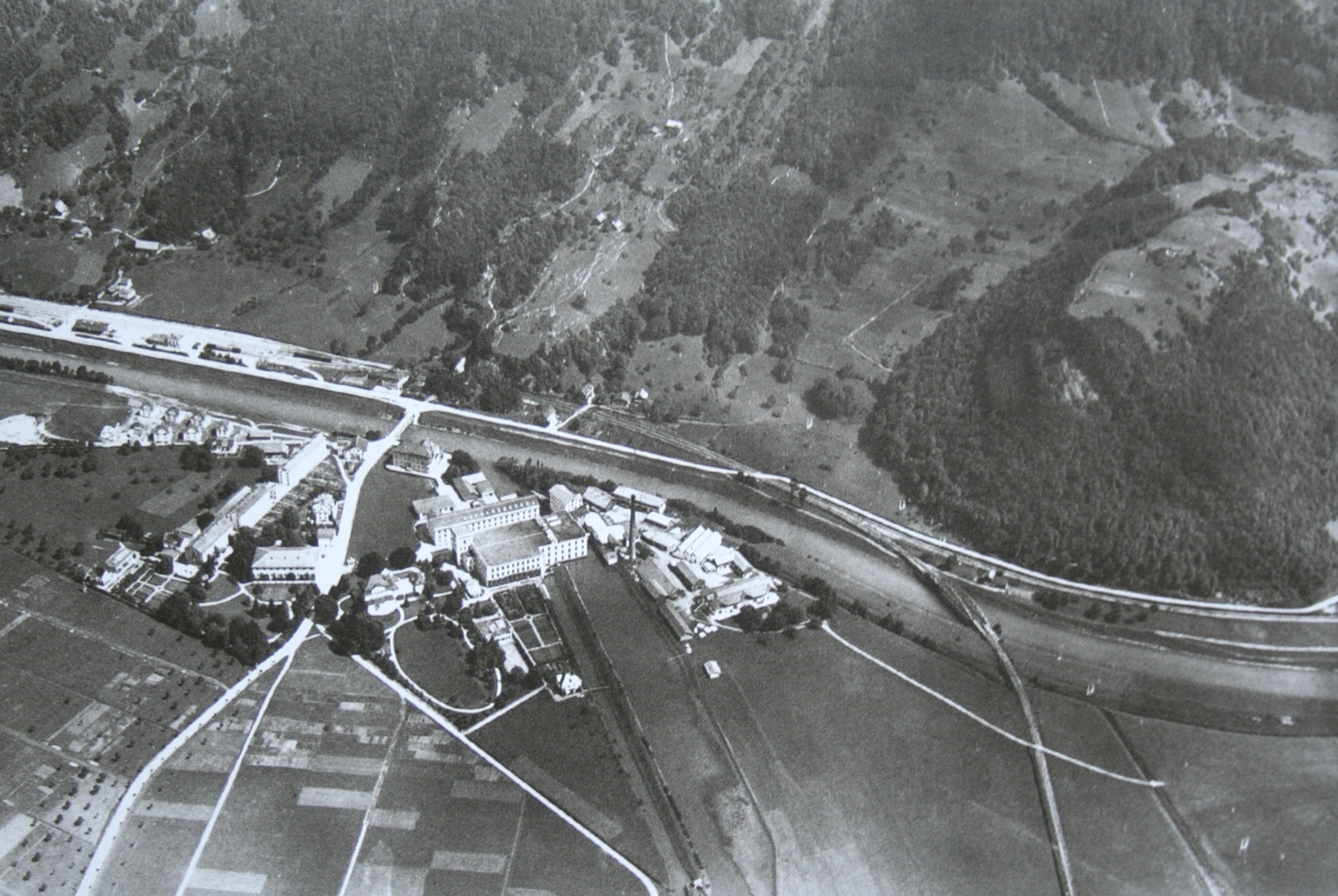 Ziegelbrücke vor 1920, Aufnahme von Walter Mittelholzer (1894 - 1937)